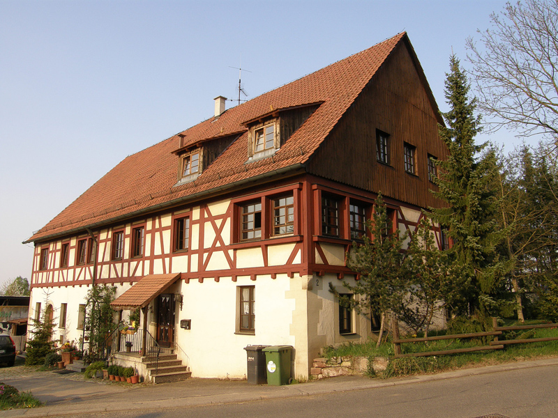 Bergheimer Hof